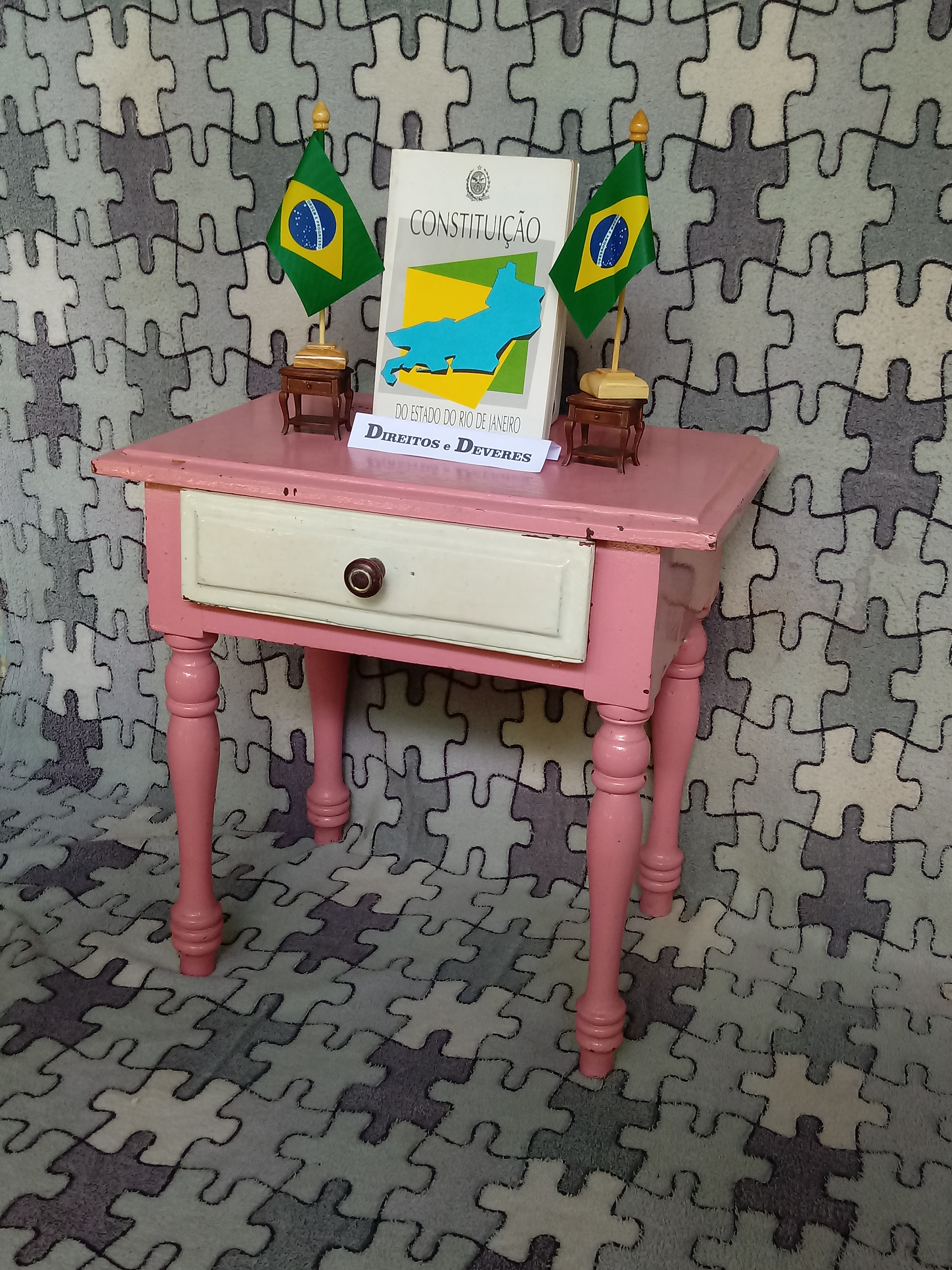 Mesa com a Constituição estadual do Rio de Janeiro impressa em 1989 pela Imprensa Oficial do Estado do Rio de Janeiro.